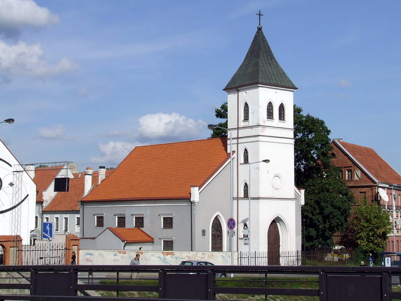 Kauno evangelikų liuteronų bažnyčia.